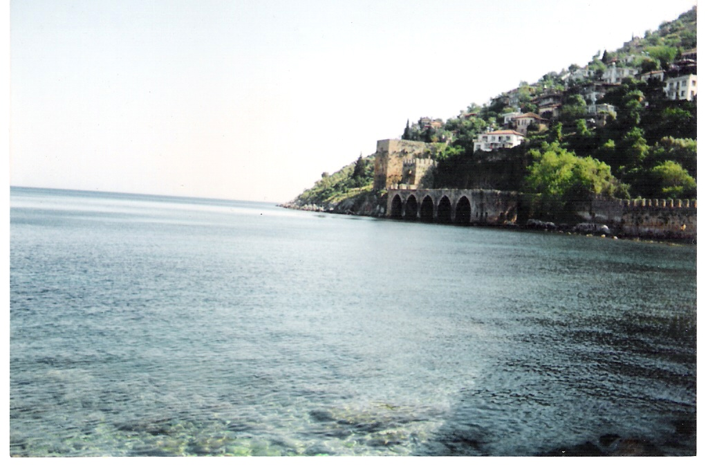 Alanya Tarihi Tersanesi